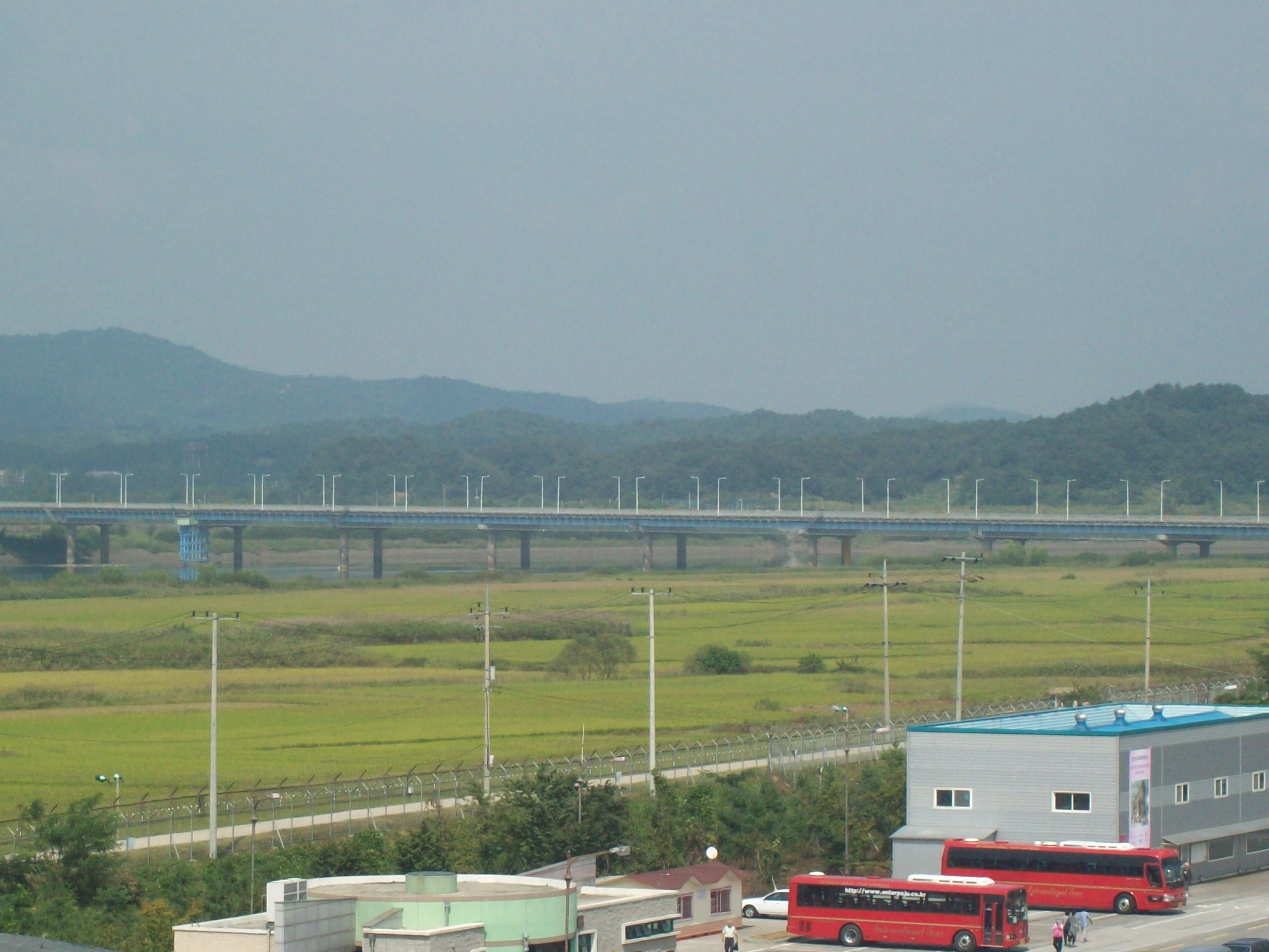 임진강을 건너가는 통일대교 모습